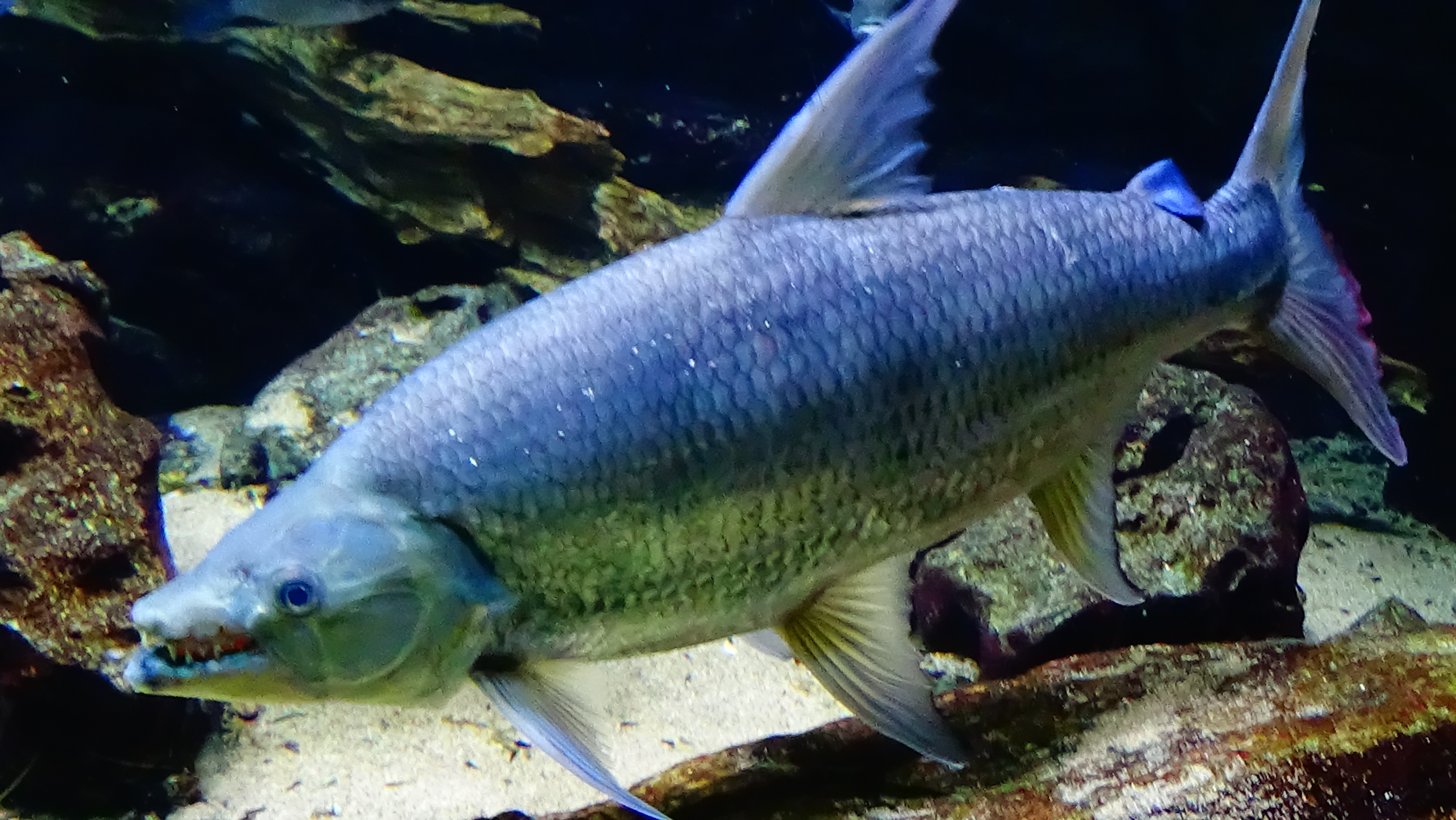 Hydrocynus goliath - Poisson-chien - Aquarium tropical du Palais de la porte Dorée, Paris, ile de France, France - 12/2014